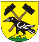 Znak obce Horní Město